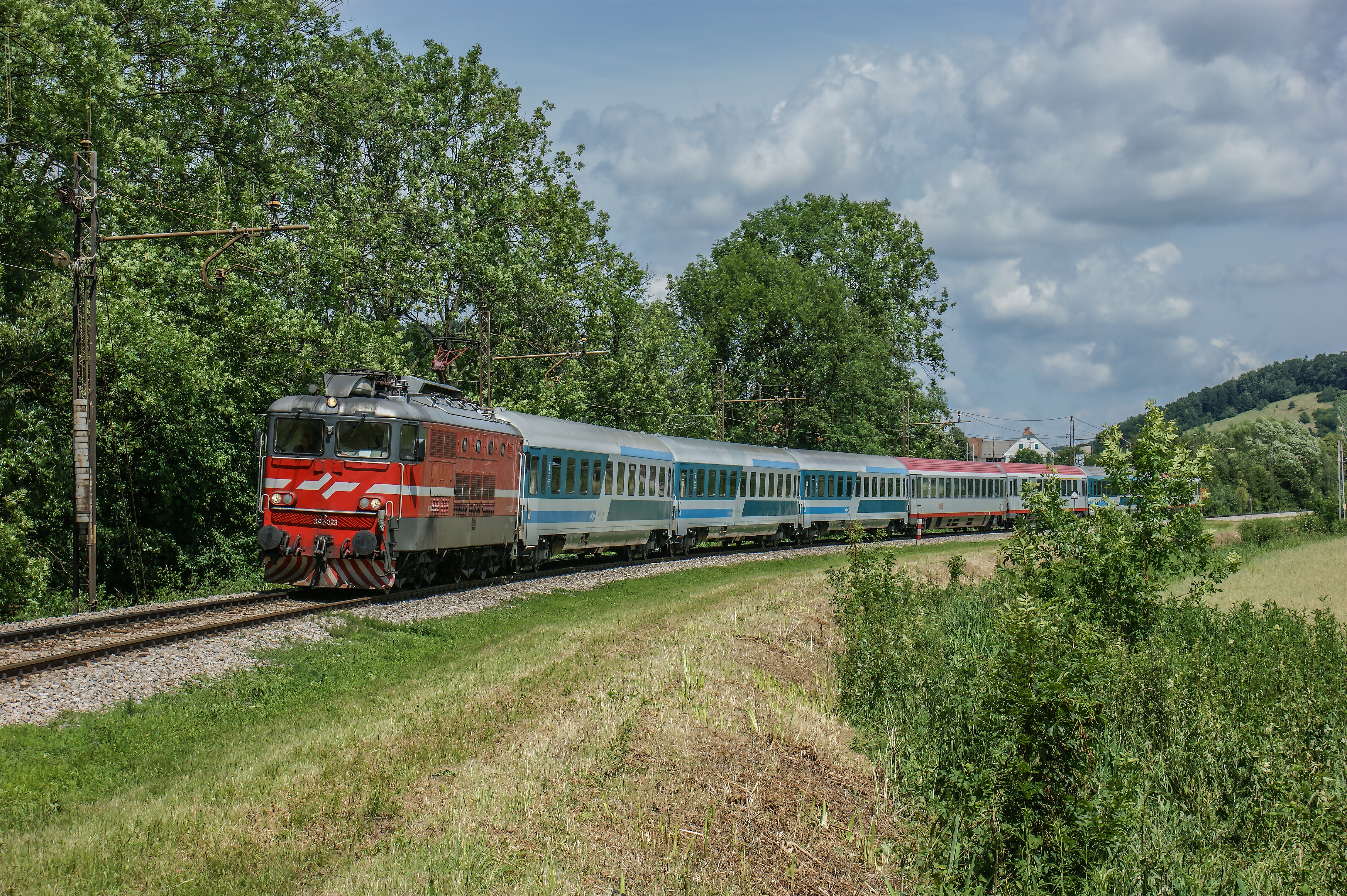 342-023 EC 151 'Emona' Wien-Südbahnhof - Ljubljana Košaki 17-06-2009 T200906-0506